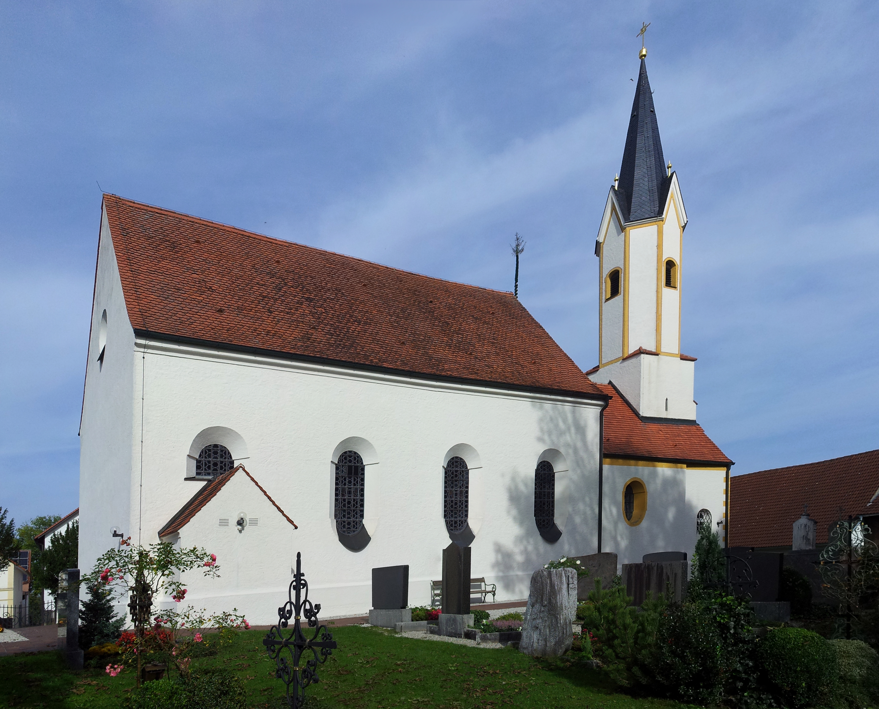 St. Ulrich im Freisinger Stadtteil Hohenbachern